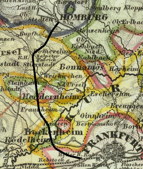 Karte von Nassau 1851 mit Ausschnitt des Bereichs, in dem später die Homburger Bahn (schwarz eingezeichnet) gebaut wird, mitsamt der den Bau verzögernden vielen Staaten: Freie Stadt Frankfurt (rot), Nassau (orange), Hessen-Kassel (gelb), Hessen-Darmstadt (grün) und Hessen-Homburg (grau).